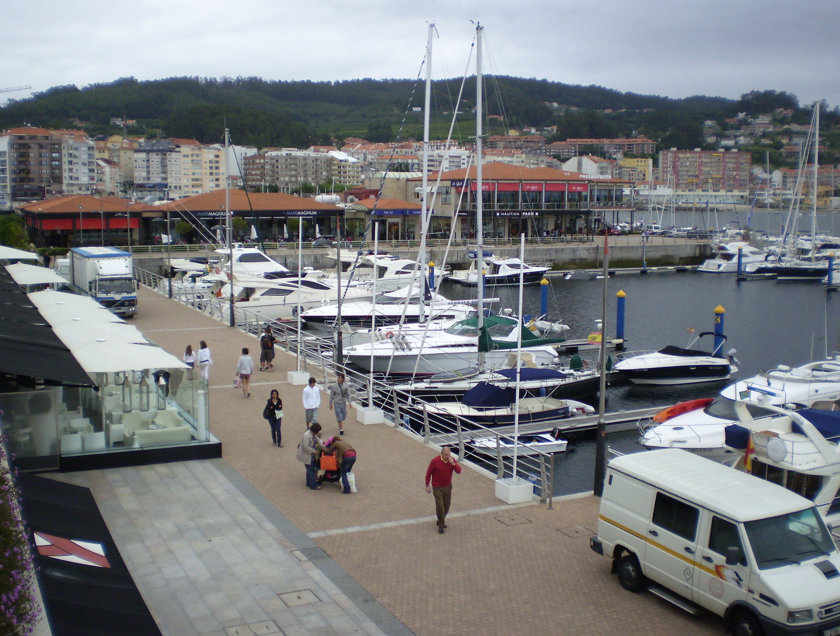 Maremagnum de Sanxenxo (Pontevedra, Galicia)